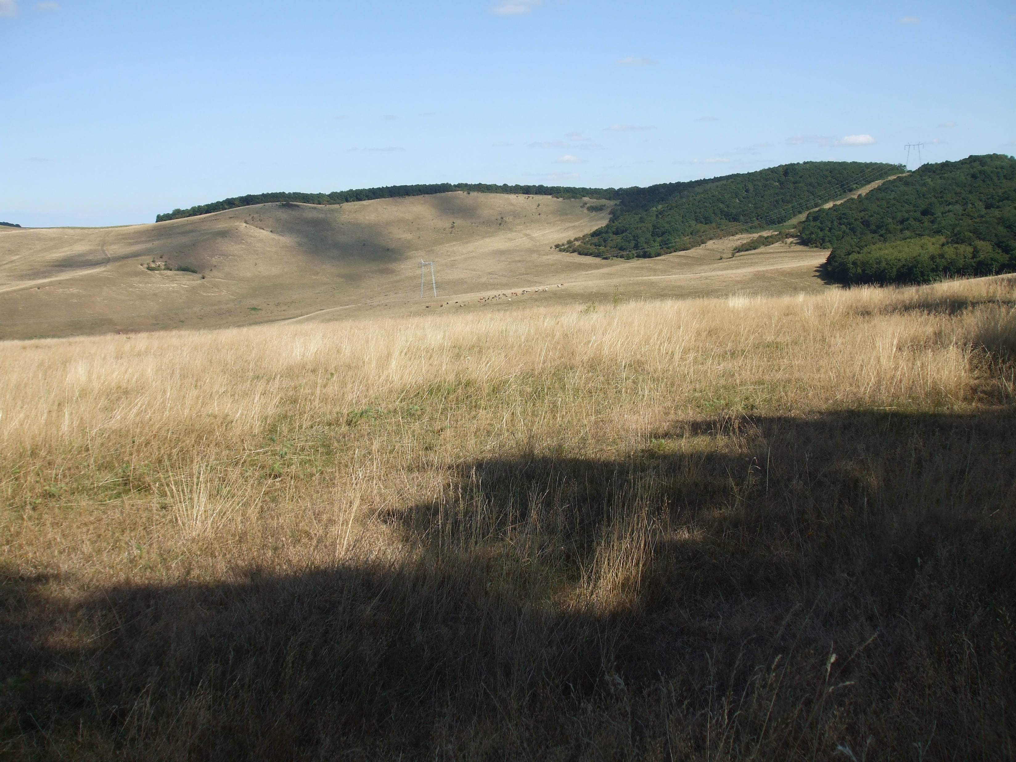 imagini din Aruncuta